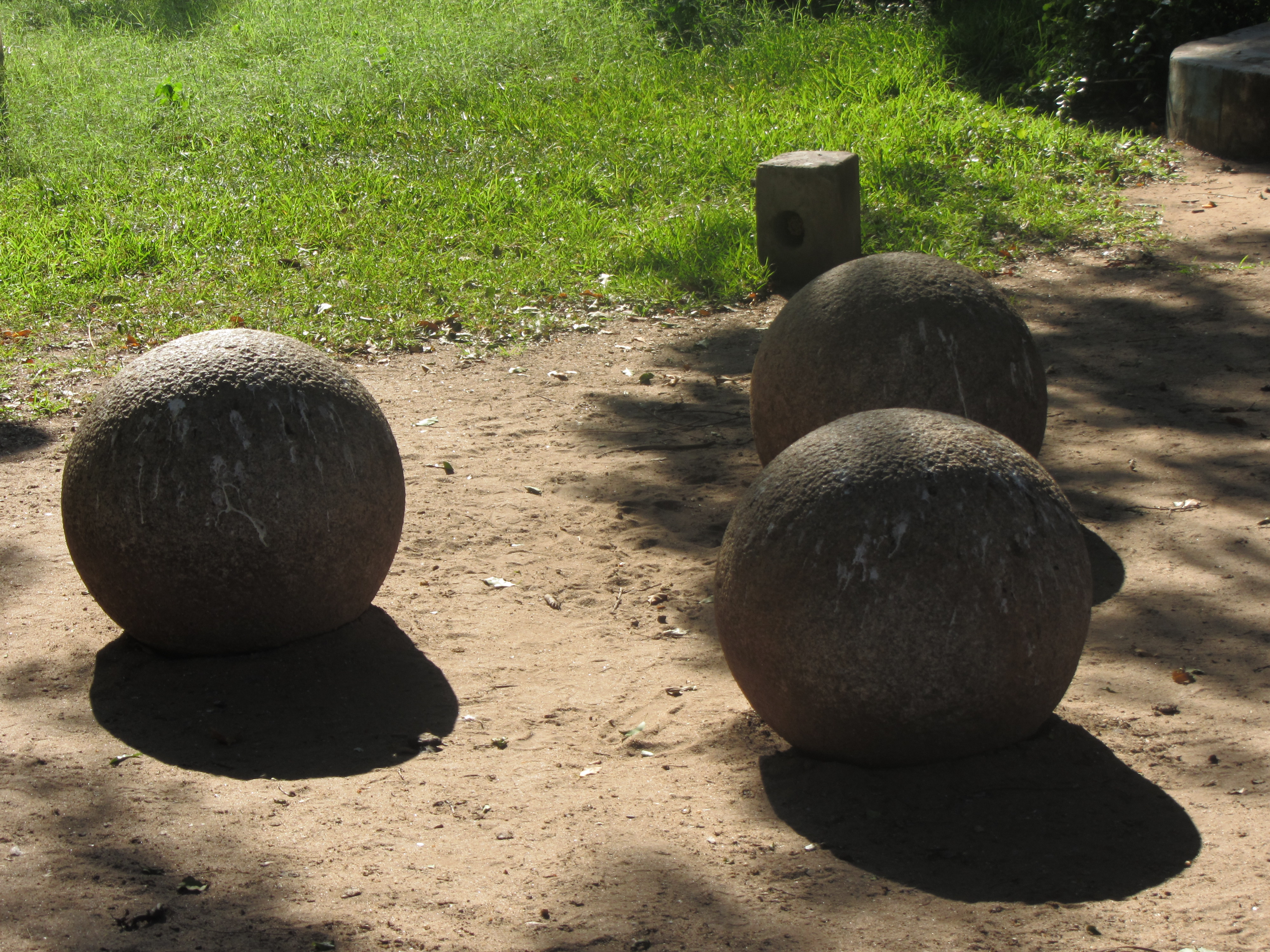 own shot - இளவட்டக்கல், இளவட்ட ஆண்கள் teenagers தங்களிடமுள்ள உடல்வலிமையை மகளிரிடம் வெளிச்சம் போடத் தூக்கிக் காட்டும் கல்.